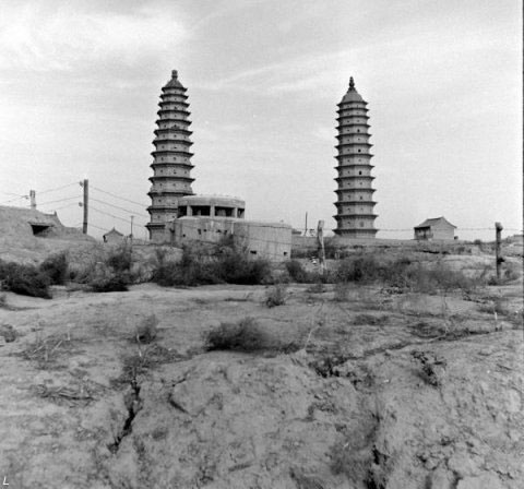 1948年，太原双塔的国军的碉堡